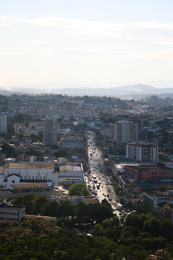 bairro da Penha